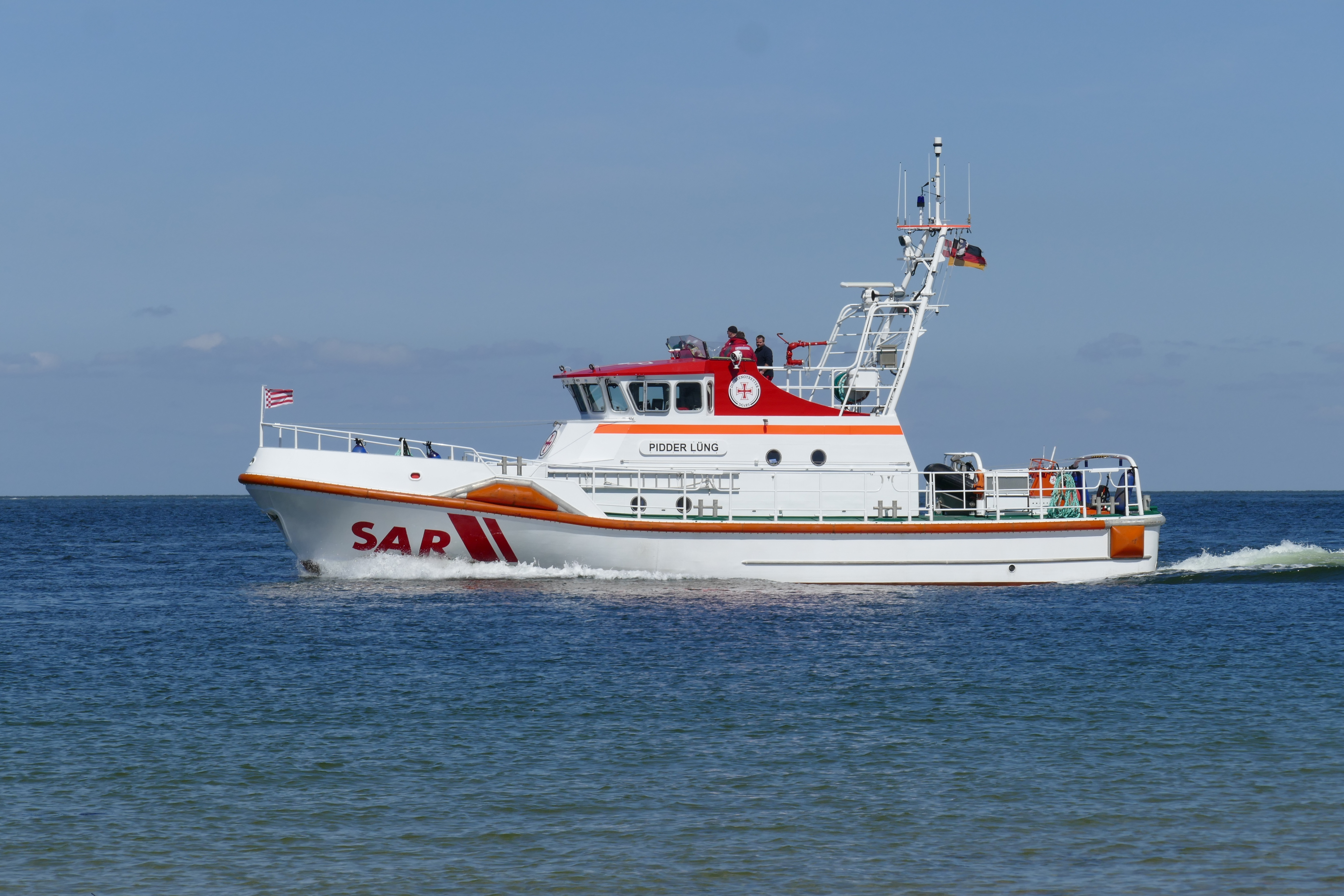 Seenotkreuzer Pidder Lüng auf dem Lister Tief